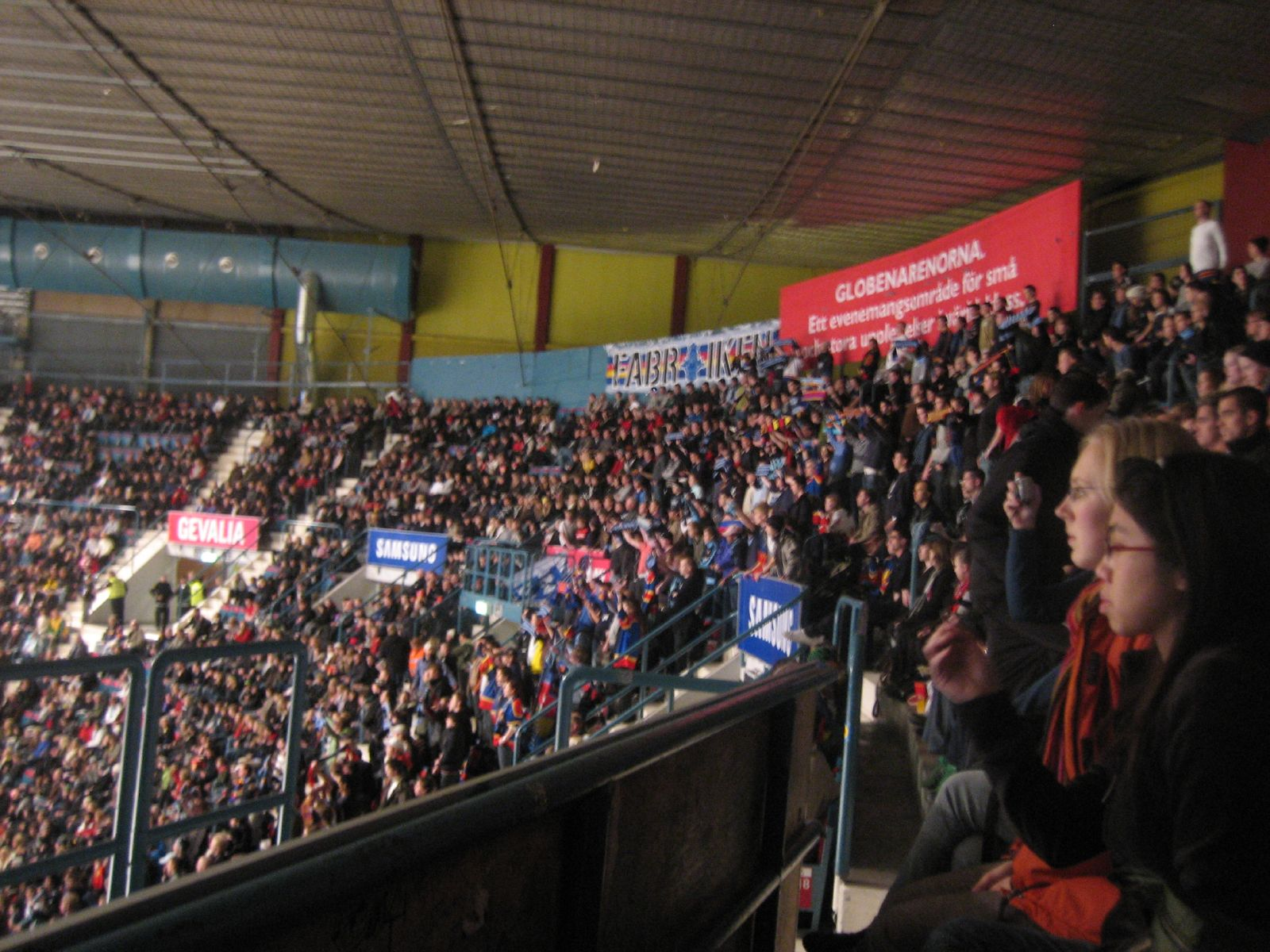 Supporters of Djurgårdens IF at Johanneshovs isstadion in Stockholm, Sweden during the Swedish Elite League game Djurgårdens IF-Södertälje SK (2-5) on Decemeber 18, 2007.